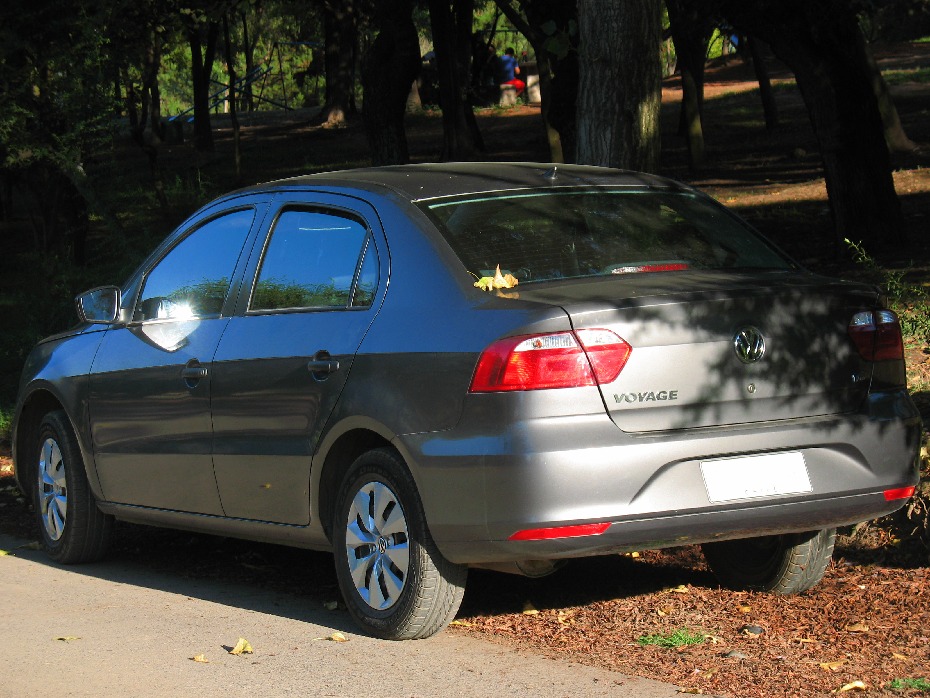 Volkswagen Voyage 1.6 Power 2014